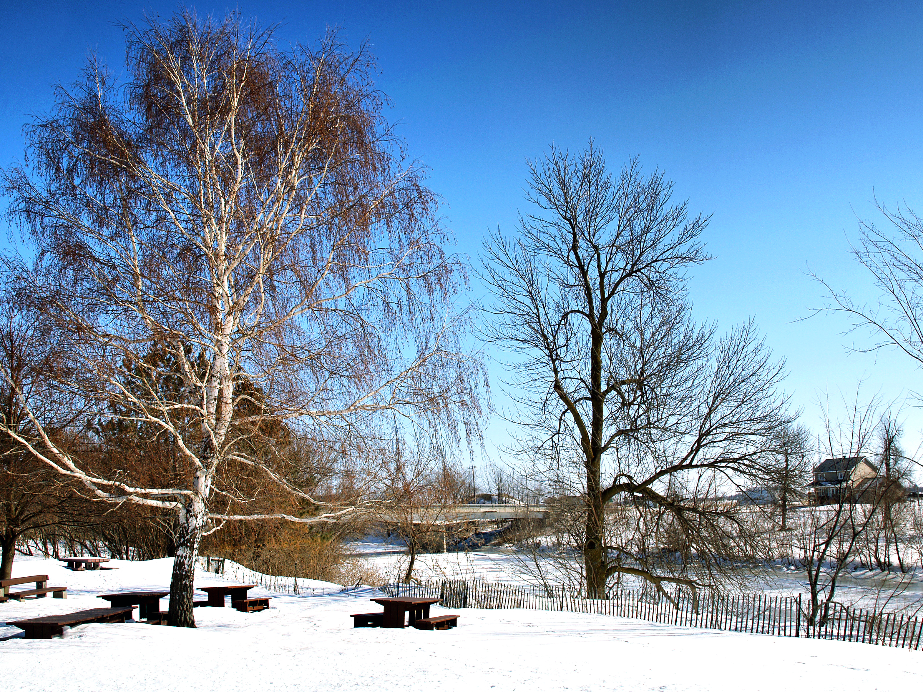 Châteauguay, Montérégie (Québec) - La rivière Châteauguay théâtre de la bataille de la Châteauguay le 26 octobre 1813